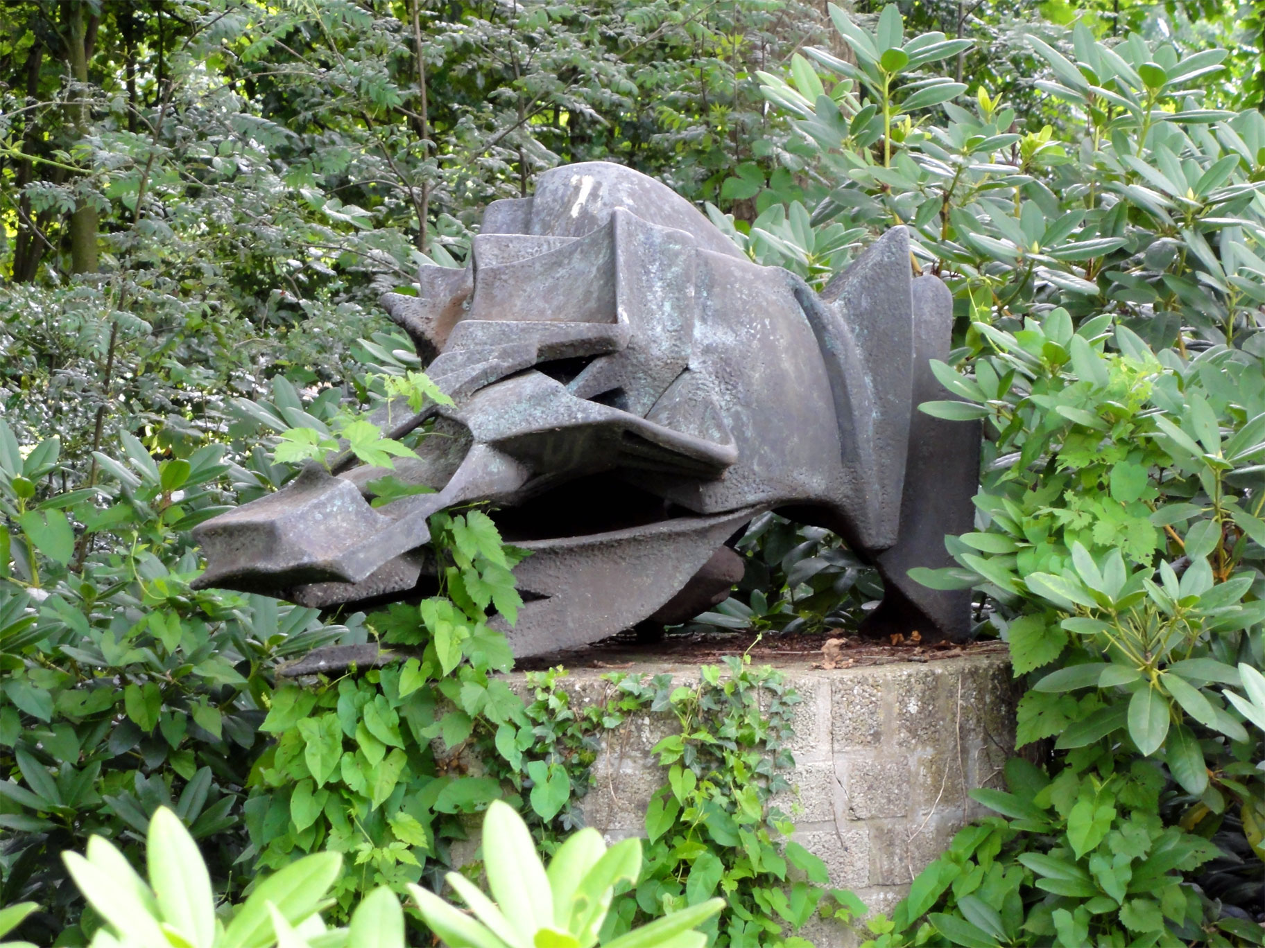 Zonder titel door Tseard en Sip Visser in het park bij het gemeentehuis te Beetsterzwaag